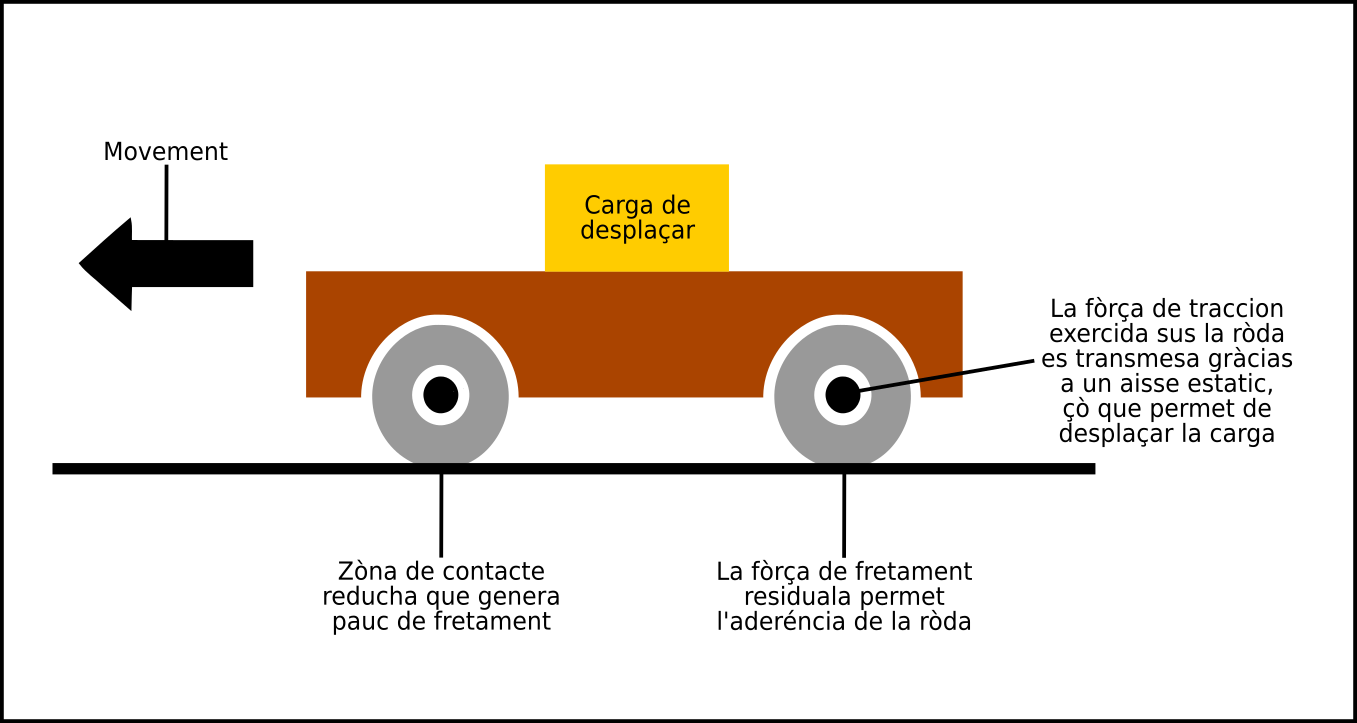 Maquina simple - Principi de la ròda